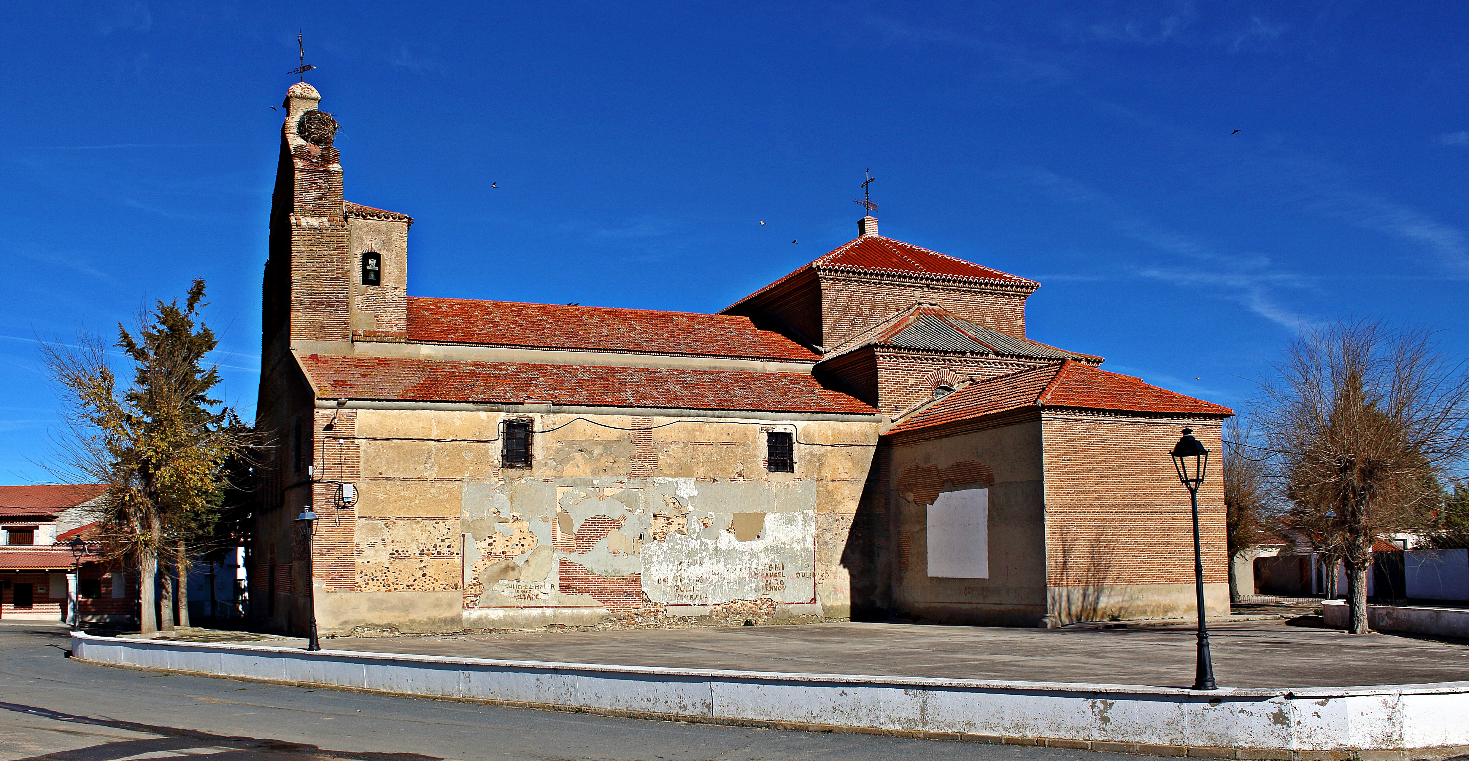 Cabezas del Pozo, municipio de la comarca de La Moraña, en la provincia de Ávila.